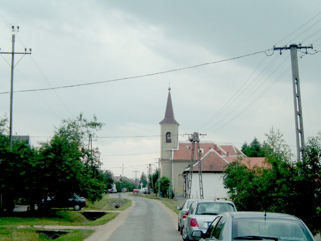 Megyehíd, Szentháromság római katolikus templom